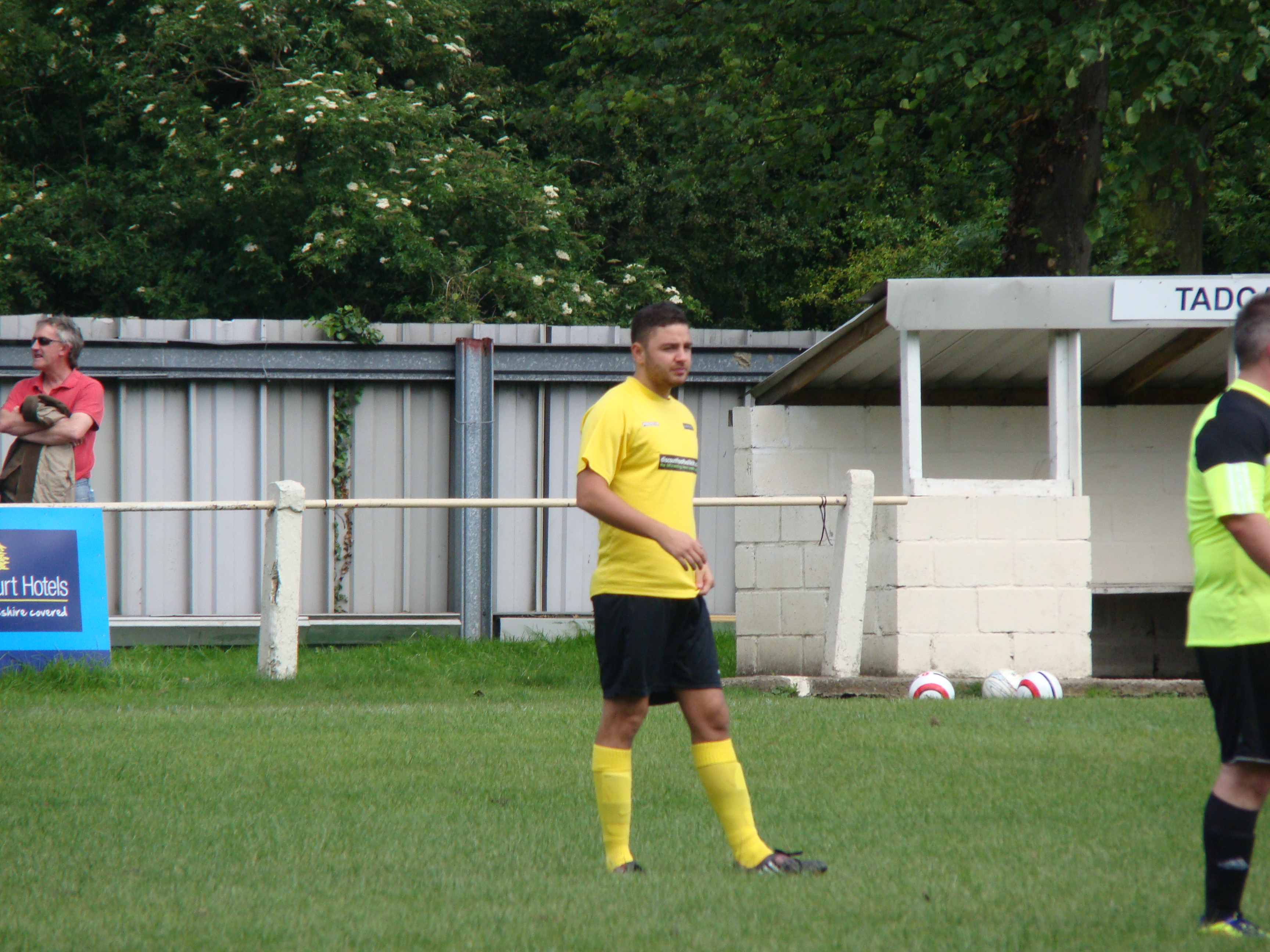 Adam Thomas